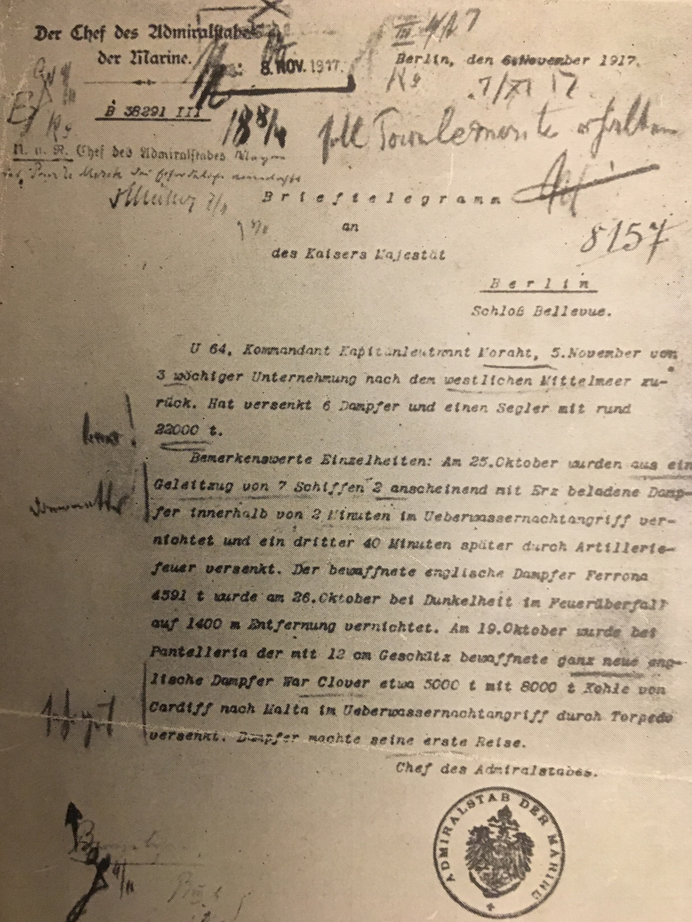 Es handelt sich um einen Bericht des Admiralsstabes der Kaiserlichen Marine an Seine Majestät, Kaiser Wilhelm II über die Erfolge des U-Bootes U64 und seinem Kommandanten Robert Morath - November 1917